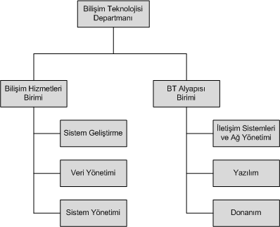 Minimal bilişim teknolojileri departmanı örgüt yapısı